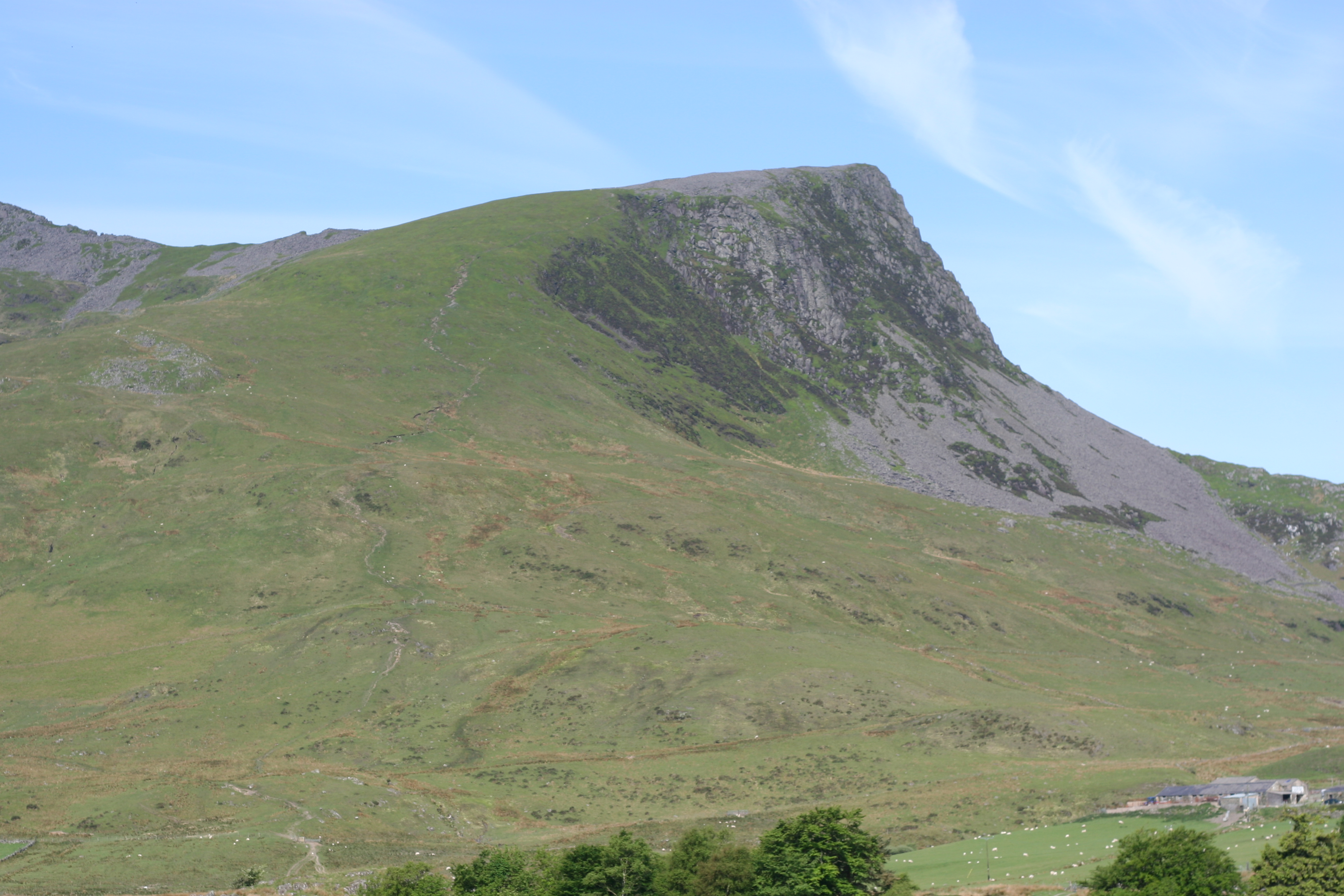 Y Garn from Rhyd Ddu 05/06/2006 Rhion Pritchard : own work